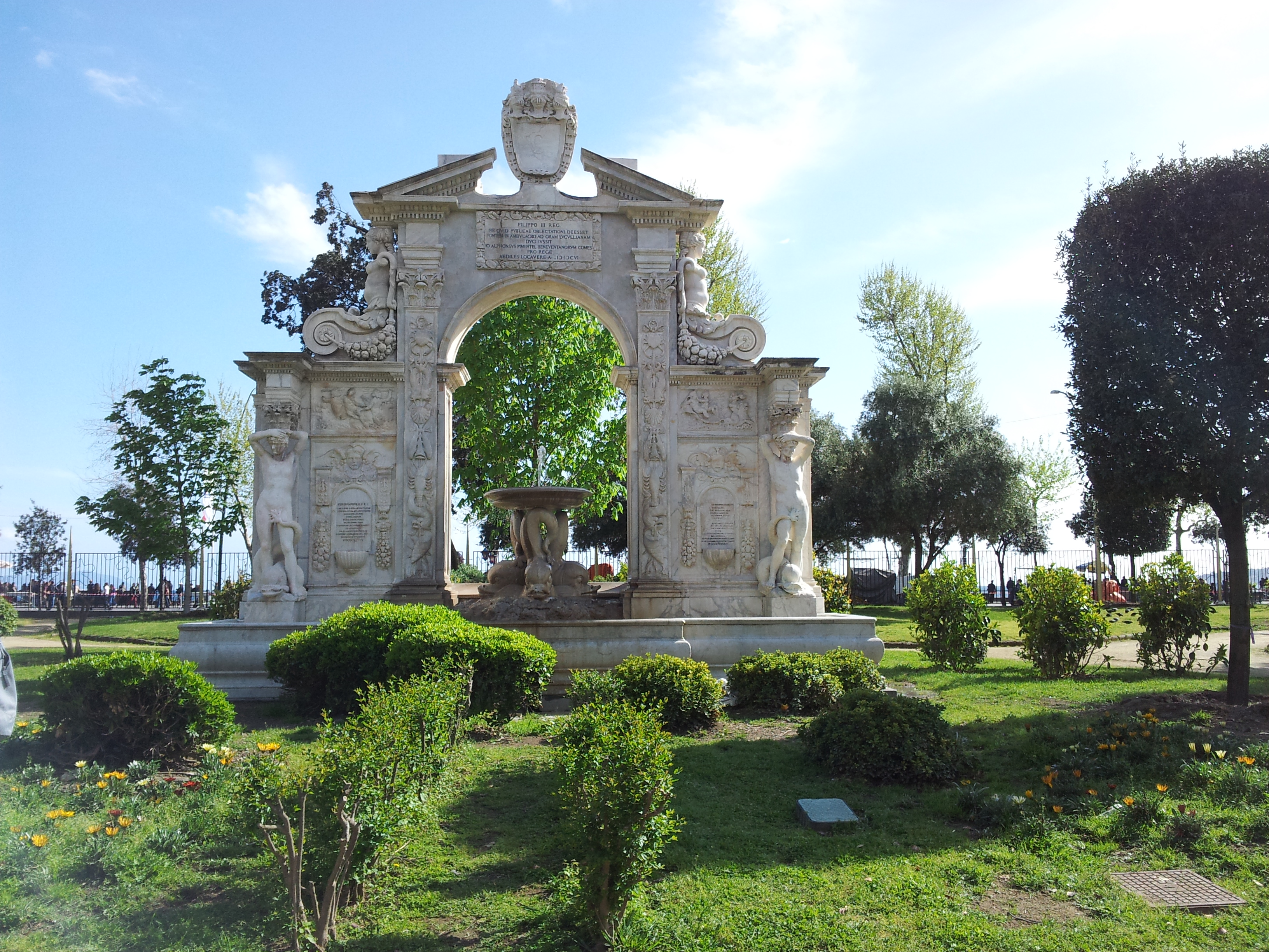 Fontana di Santa Lucia (Villa Comunale, Napoli)